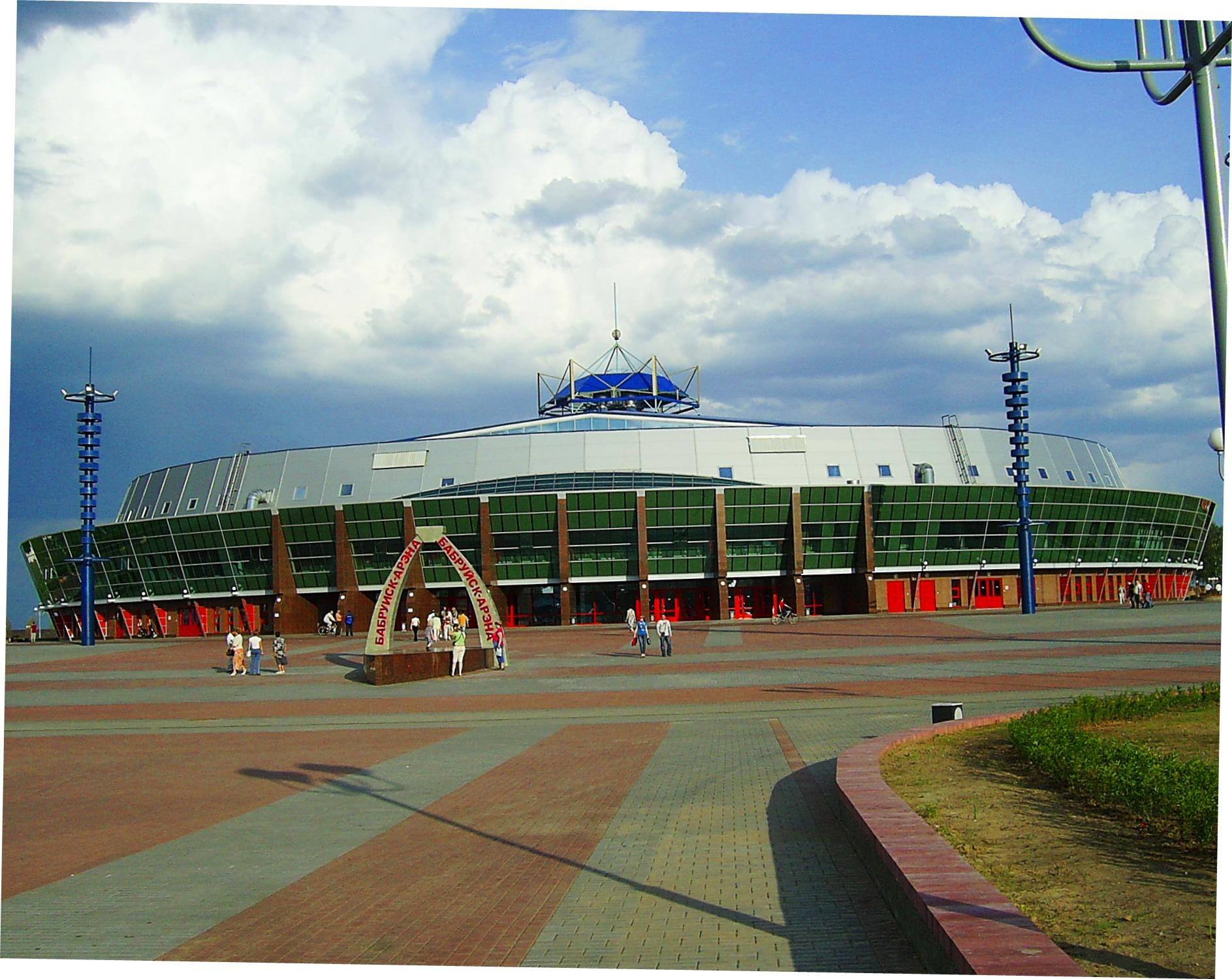 Ледовый дворец в Бобруйске